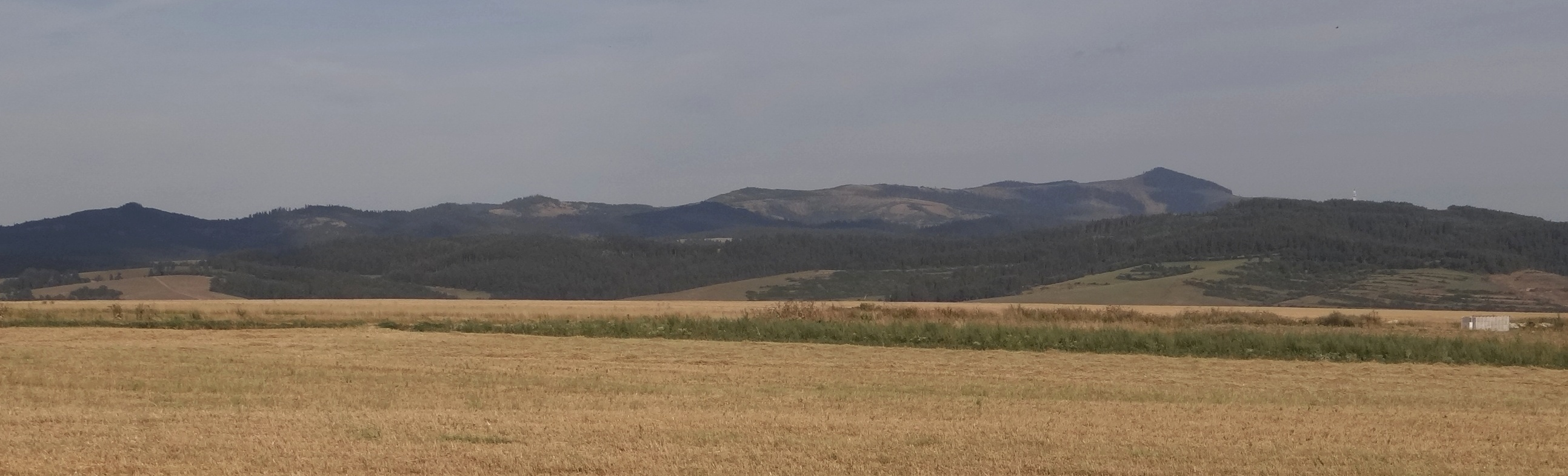 Levočské vrchy, view from Spišská Belá